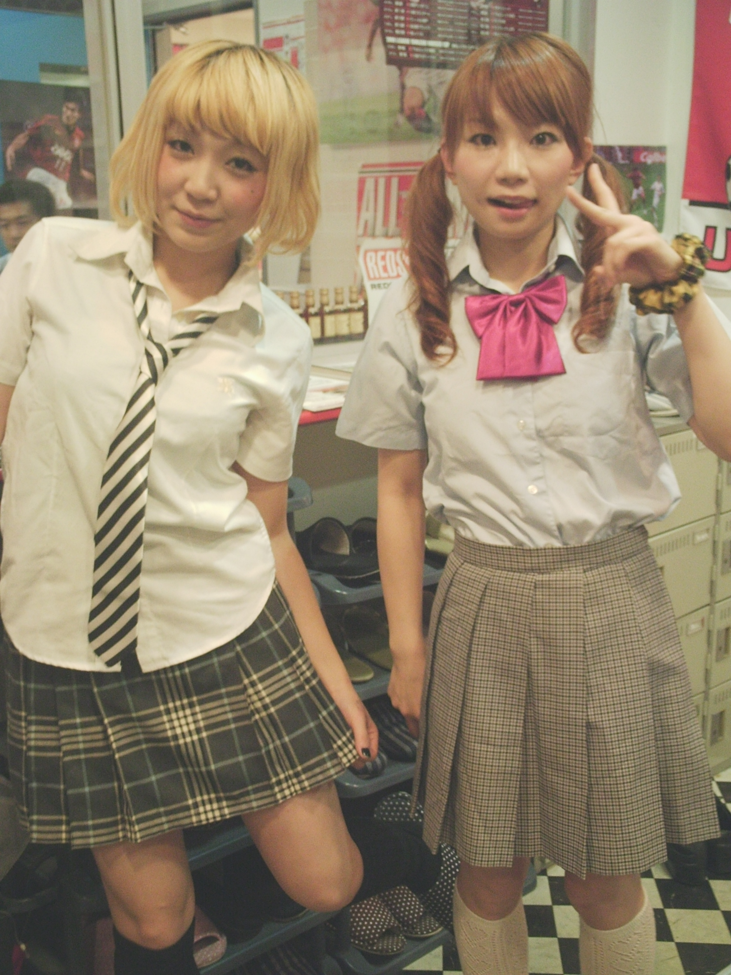 つーから (2009年6月)